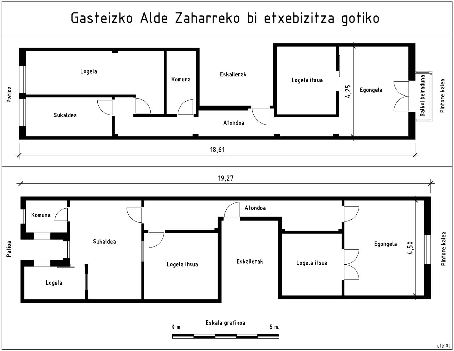 Gasteizko Alde Zaharreko bi etxebizitza gotiko